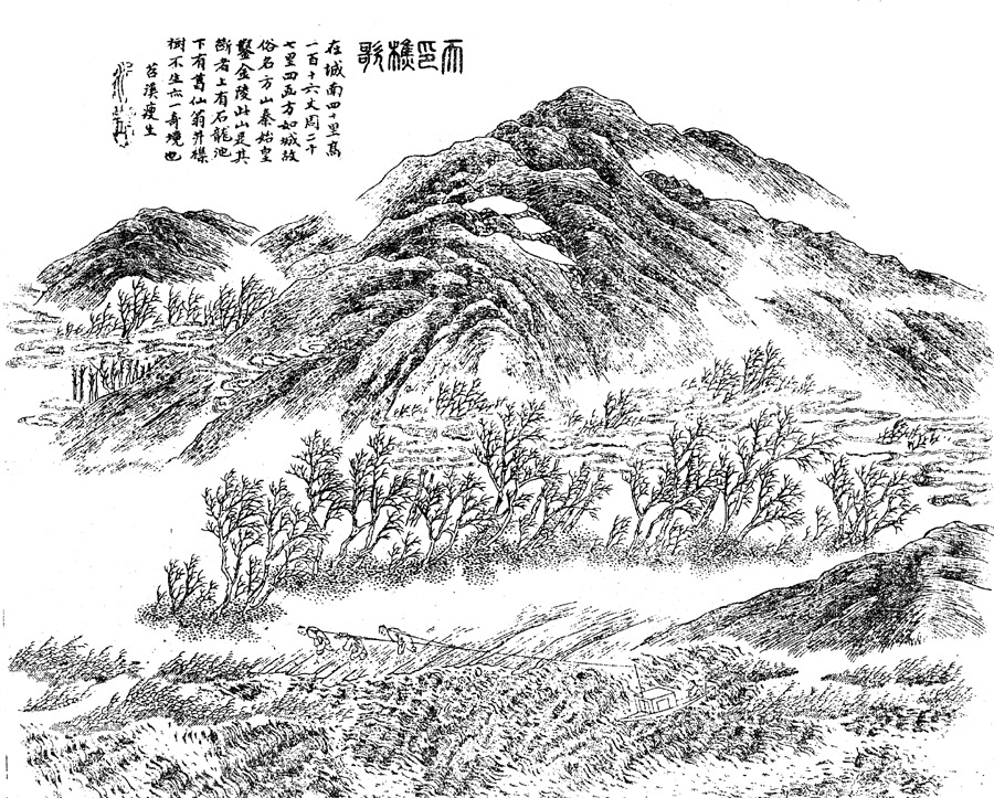 长干里客金陵四十八景图，封面标注了“长干里客金陵四十八景图……岁阴在赤奋若天中节蒲华馆主”，即1888年端午节。清光绪戊子申昌书局石印，款署端木瘦生及苕上徐虎，长干里客、端木瘦生均指清人徐虎。